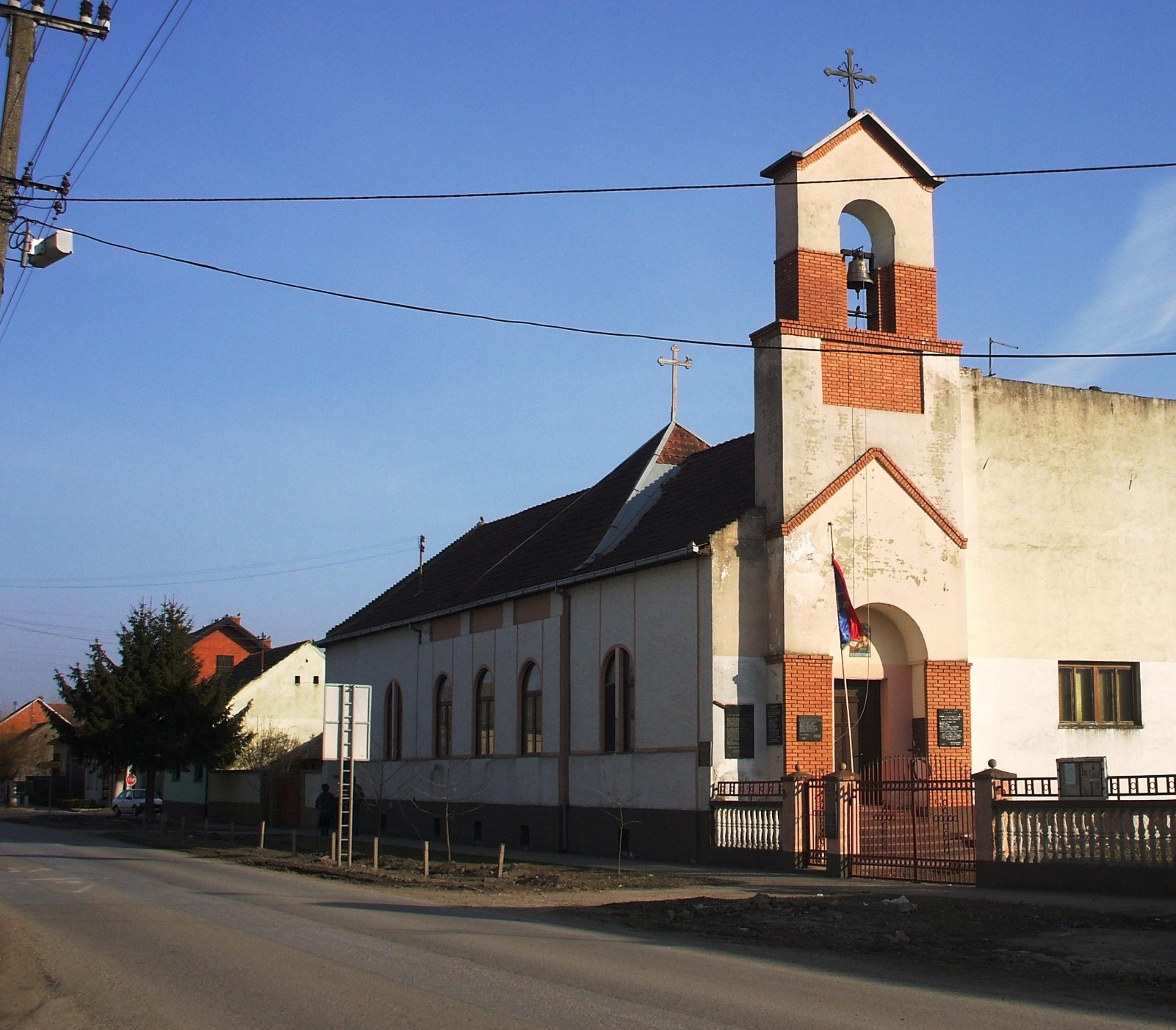 Некадашња српска православна црква у Кукујевцима, у згради бивше школе. Срушена 2015. године, подизањем новог храма.